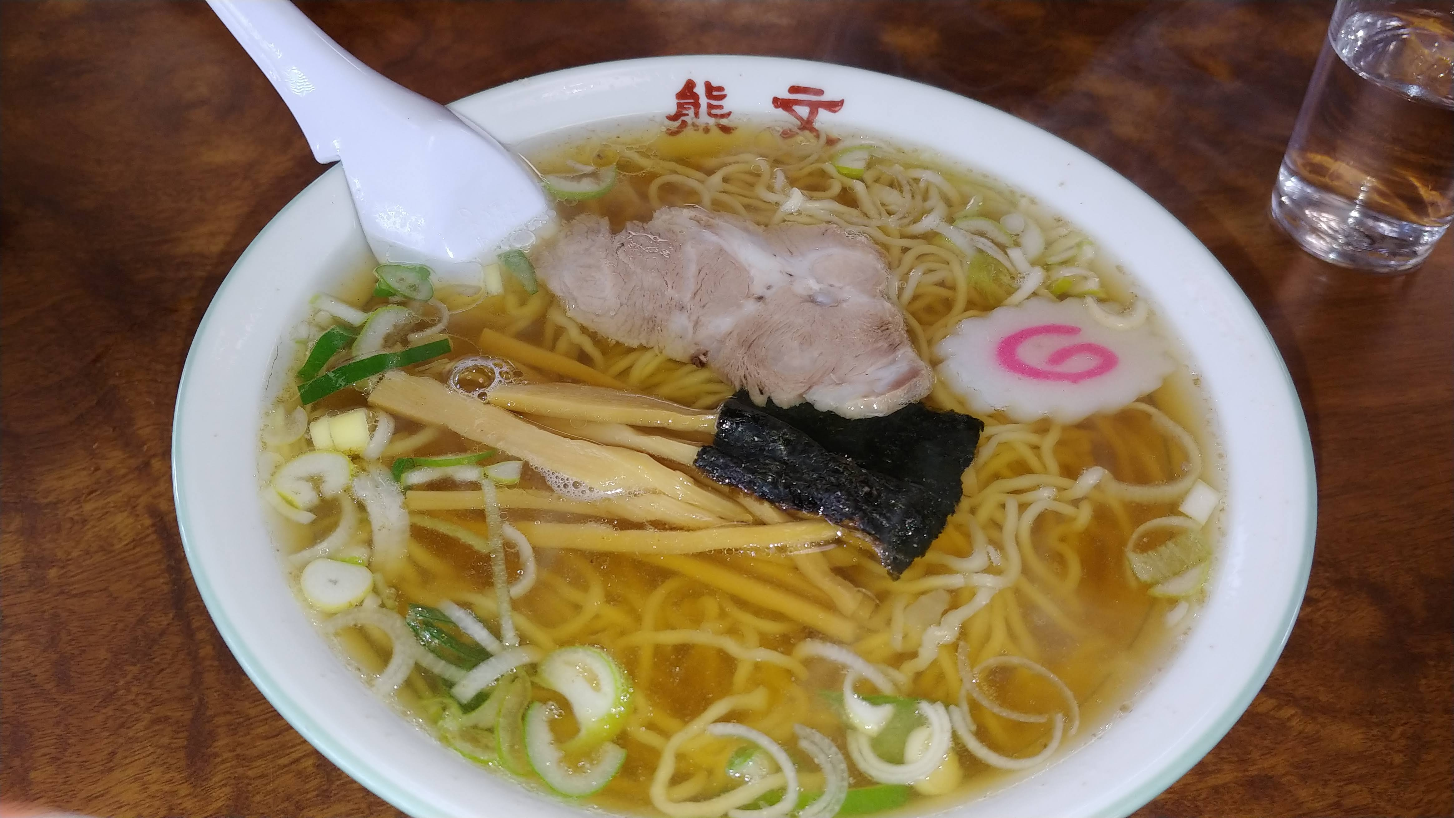 山形県米沢市の「米沢ラーメン」の例（お店：米沢市 熊文）